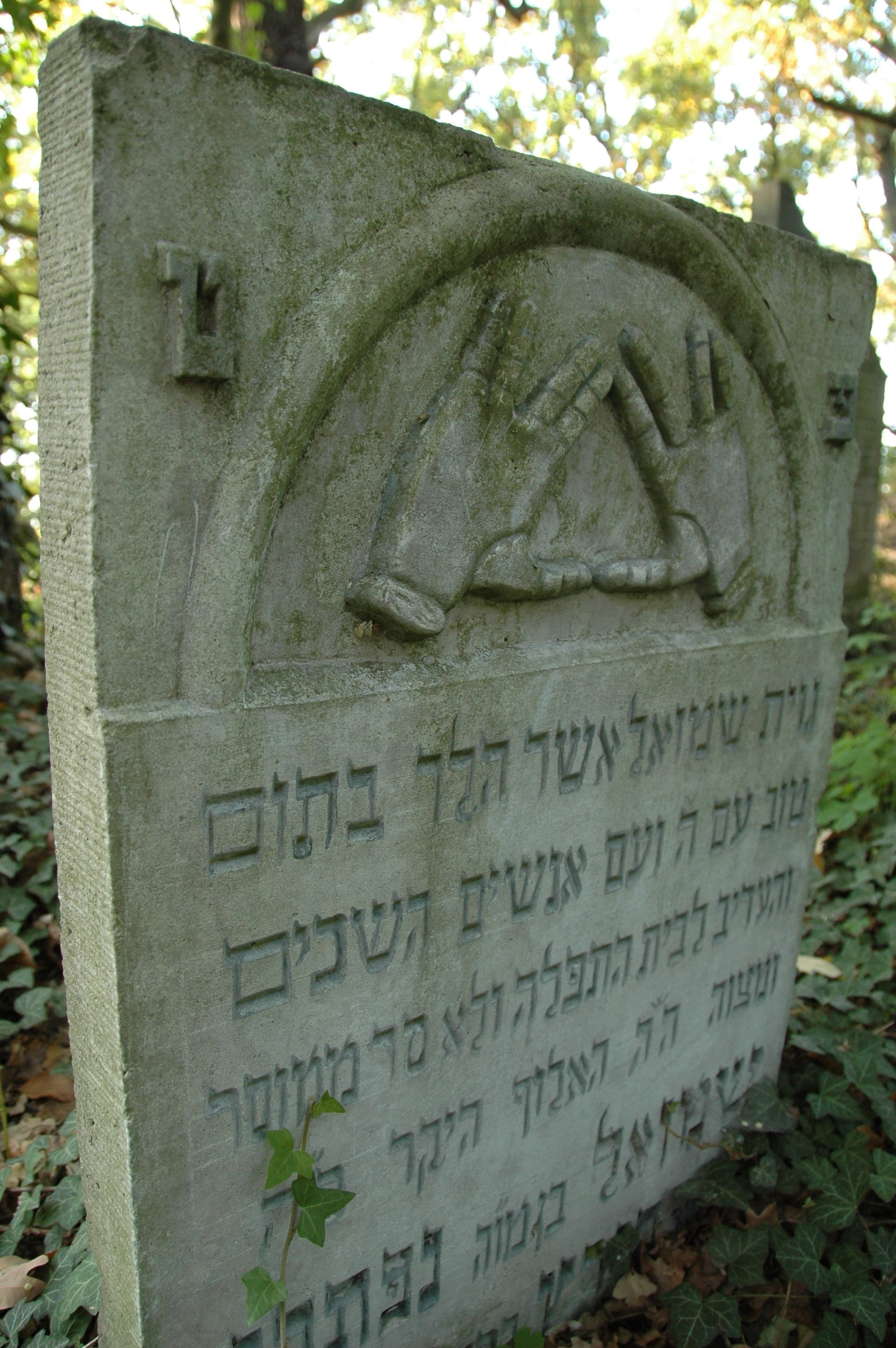 Jewish cemetery in Skwierzyna (lubuskie voivodeship, Poland).